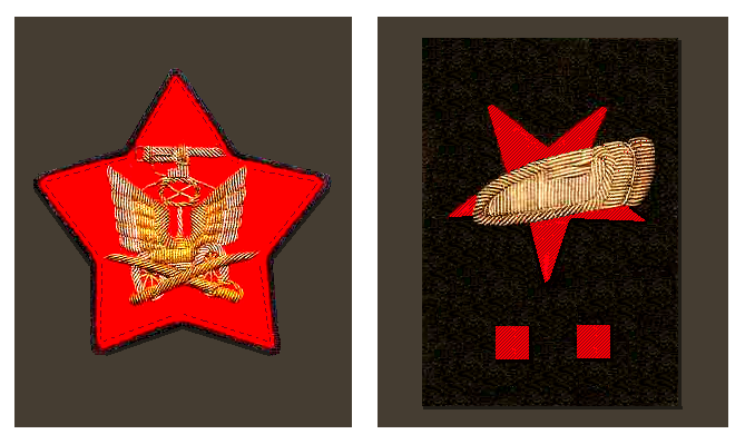 комсостав РККА